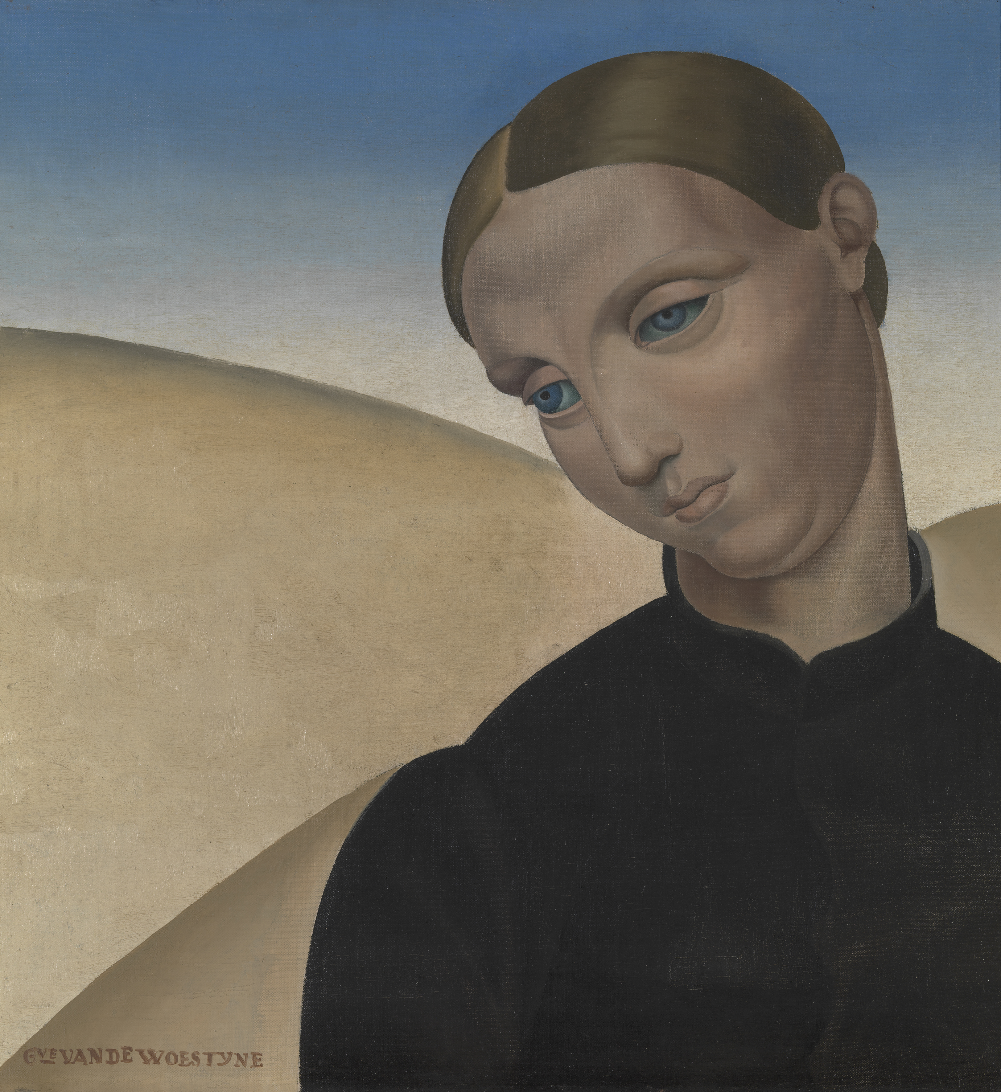 Gustave Van de Woestyne, Boerin, ca. 1925, olieverf op doek, 60 x 58 cm.